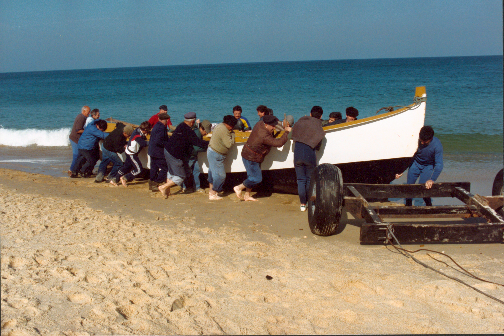 Chargement de la pinasse Anne-Marie sur le chariot ; Cap de l'Homy, Lit-et-Mixe, France